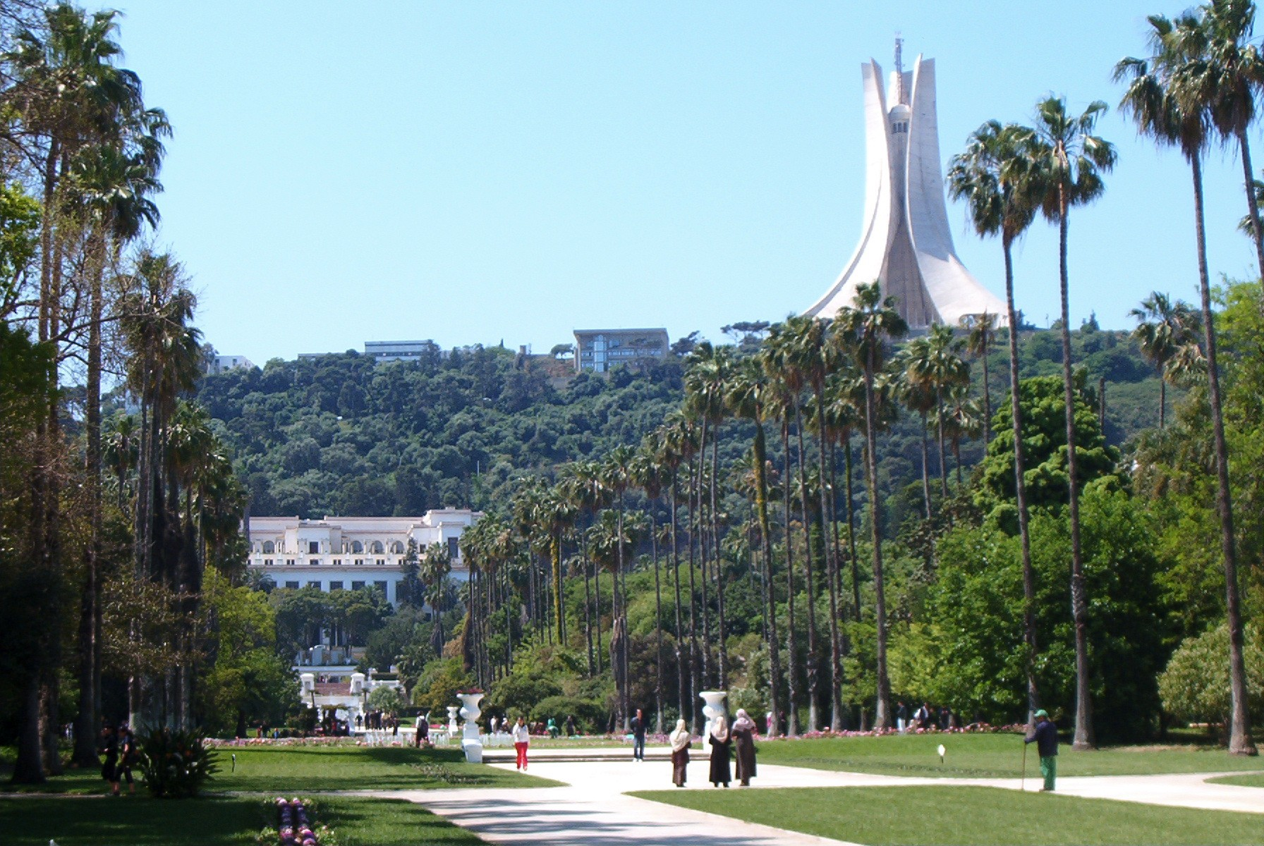 Le Musée des Beaux-Arts d'Alger vu depuis le Jardin d'Essai